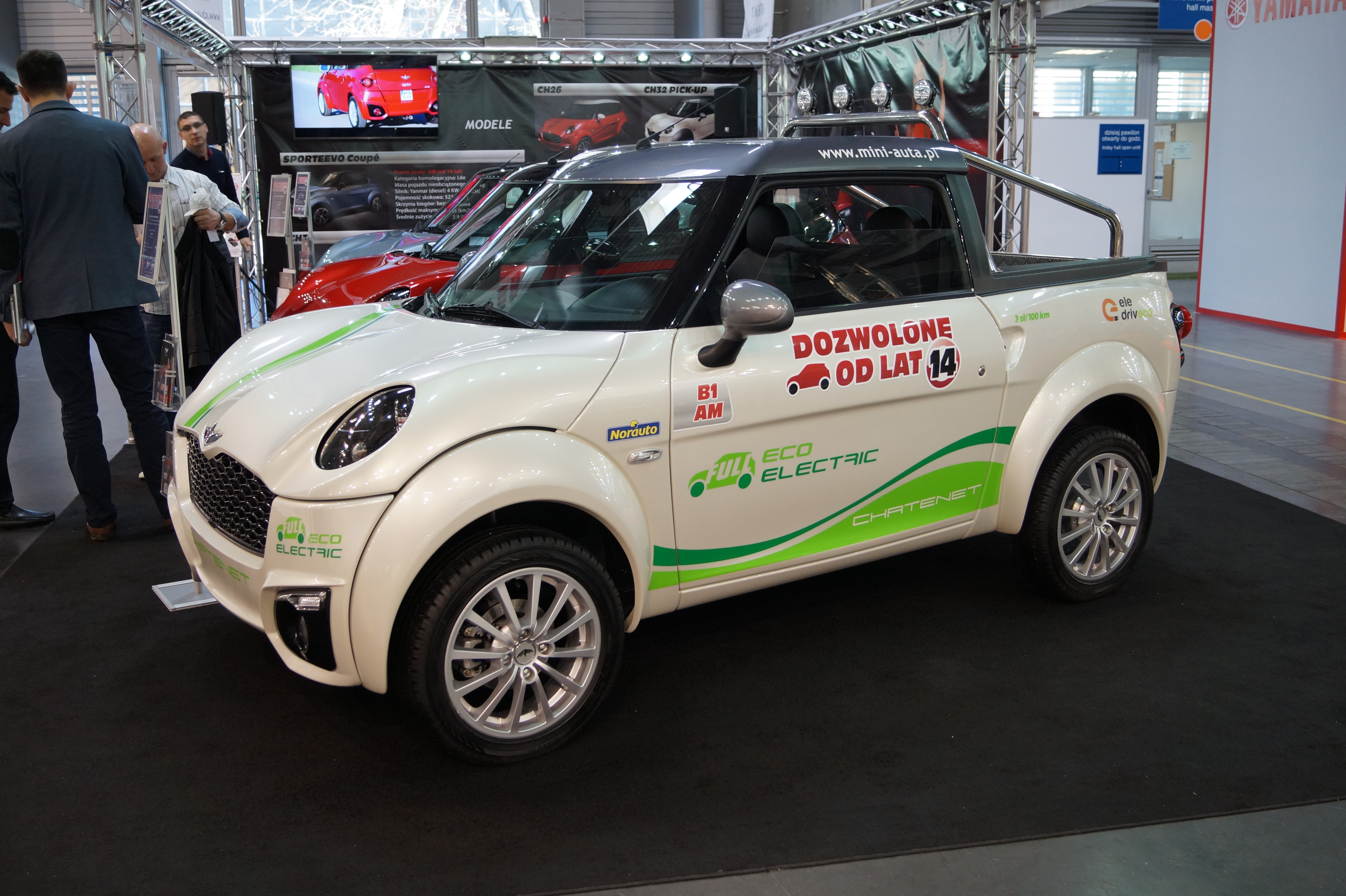 The making of this document was supported by Wikimedia Polska Association, within Wikigrant no. WG 2015-19. English | polski | +/− Chatenet CH32 z polskim silnikiem elektrycznym na Motor Show Poznań 2015